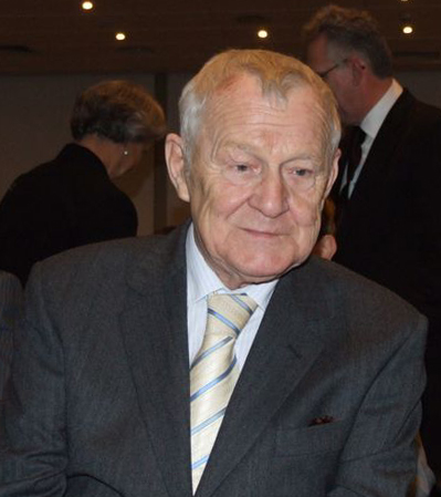 Mieczysław Rakowski, (Tygodnik Polityka, Warszawa, ul. Słupecka 6. Rozdanie Nagród Historycznych Polityki 2006. Spotkanie z laureatami: Beauvois, Andrzejem Chwalbą, Mieczysławem F. Rakowskim, Herykiem Schönkerem.)